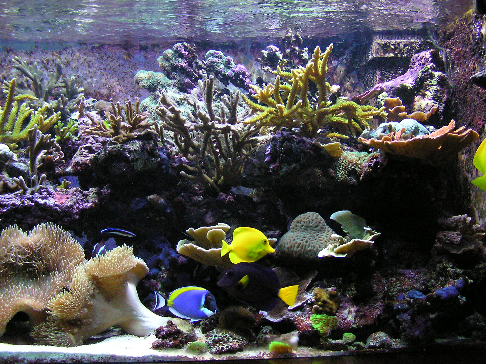 Vue d'ensemble d'un aquarium récifal privé de 460L